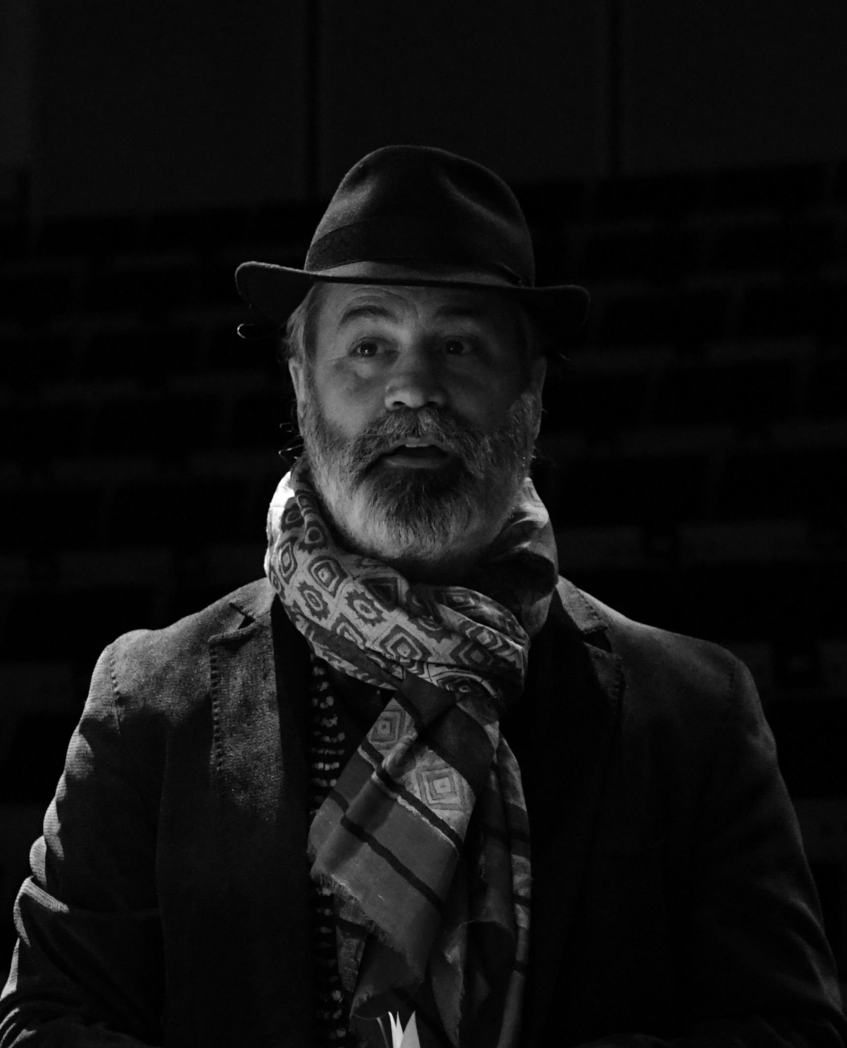 lors de la Magnifique avant garde au conservatoire de Reims.